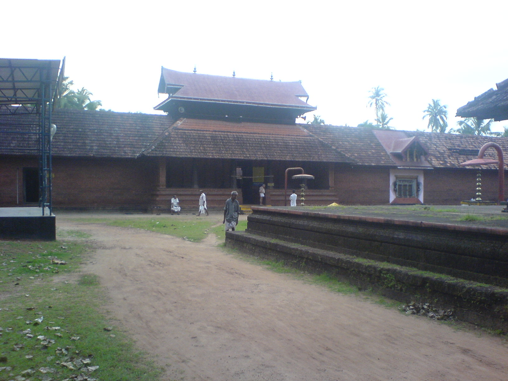 ചെറുകുന്ന് അന്നപൂർണ്ണേശ്വരി ക്ഷേത്രം,കണ്ണൂർ